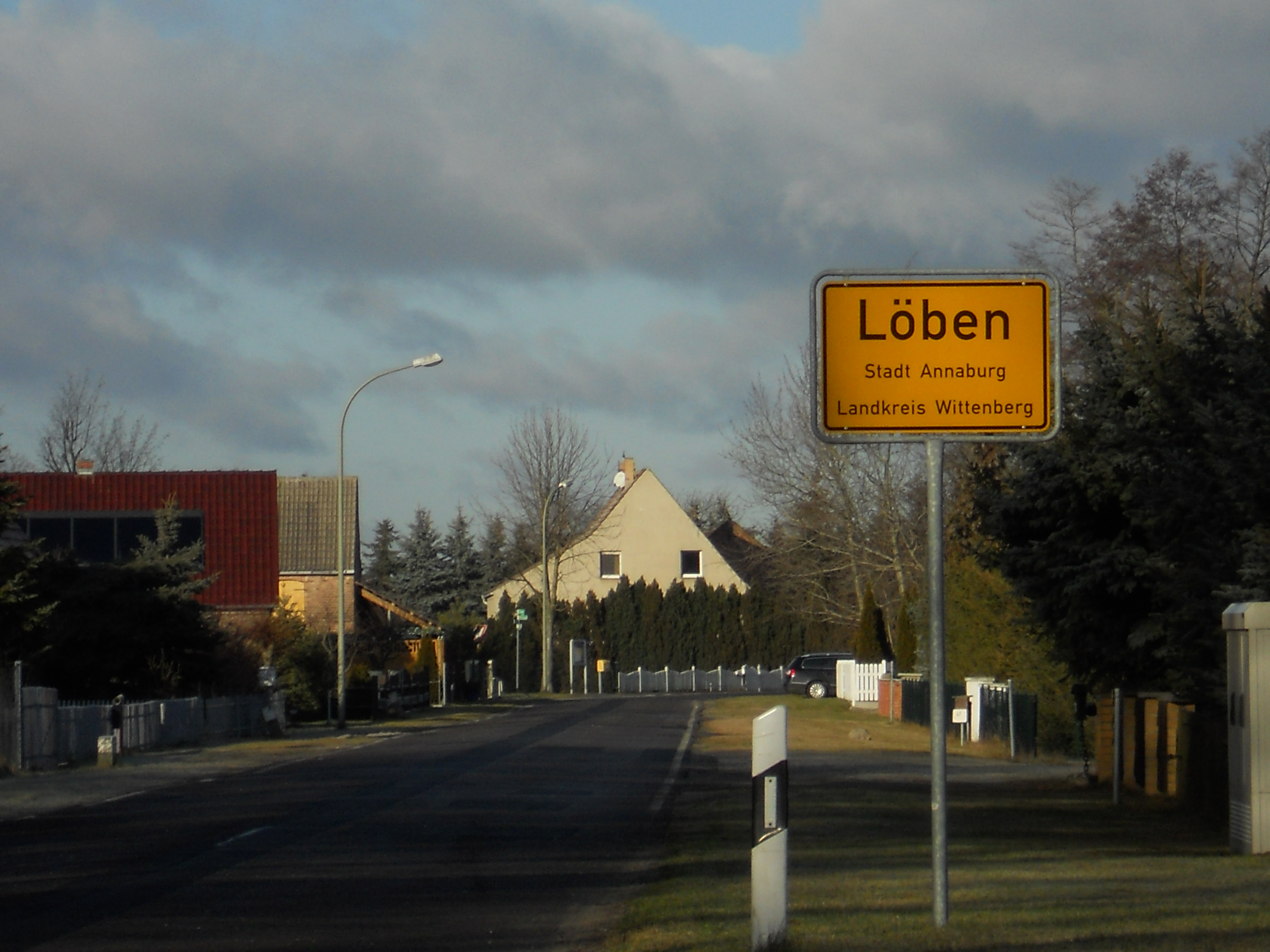 Ortseingangsschild Löben Stadt Annaburg